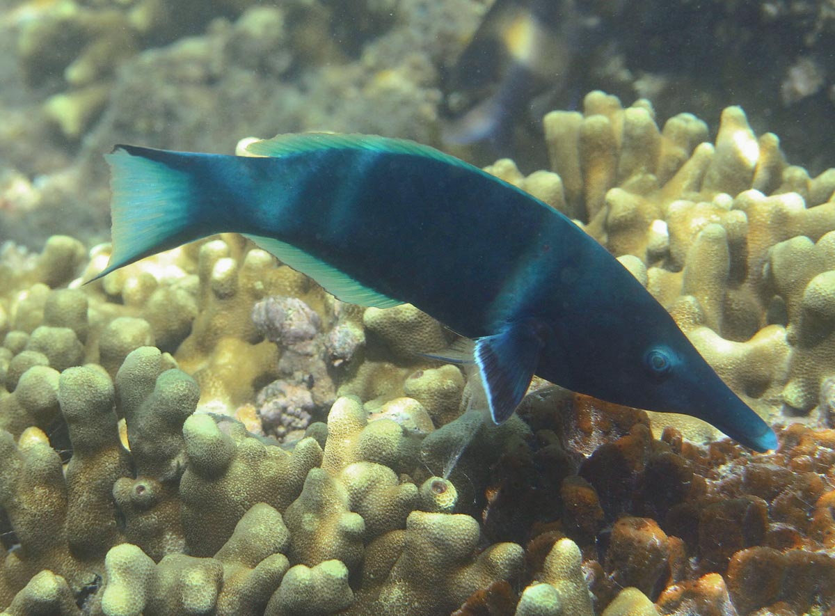 Un labre-oiseau (Gomphosus caeruleus) mâle à la Réunion.